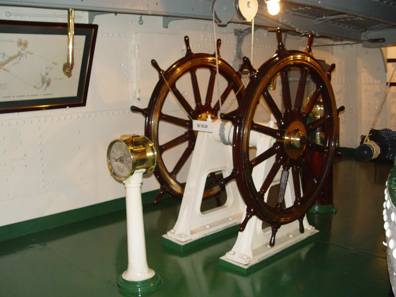 Sala de gobierno de combate del monitor Huáscar